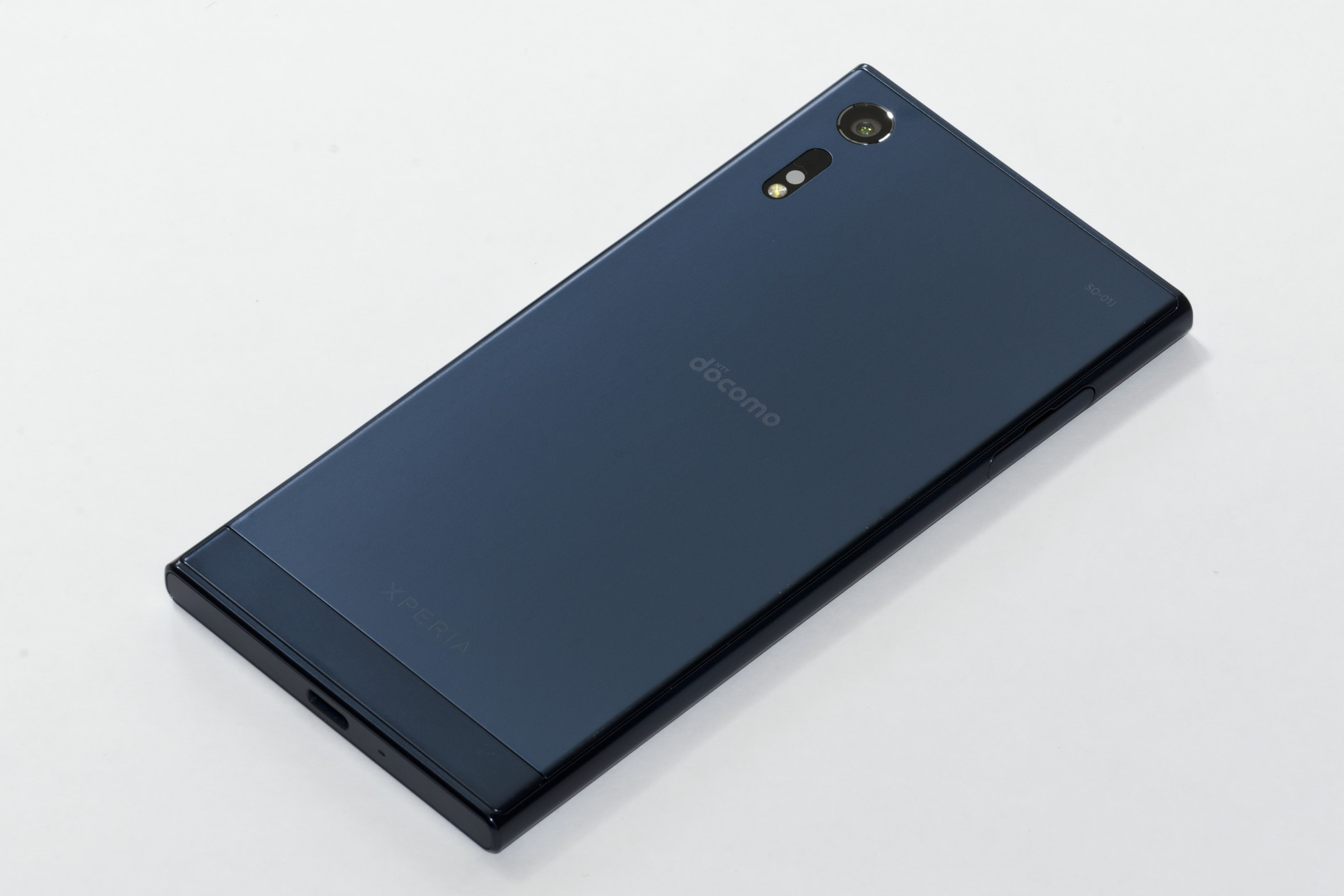 NTT docomo Xperia XZ SO-01J (Forest Blue)